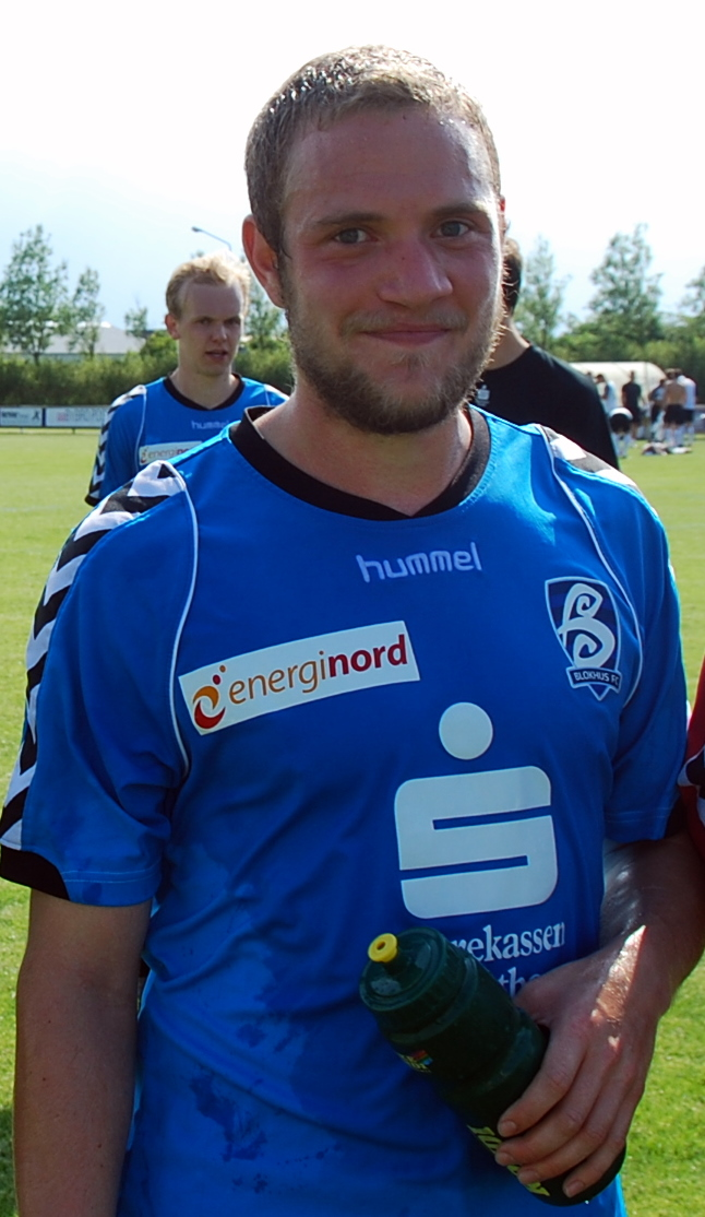 Fodboldspilleren Christian Overby fra Blokhus FC. Her efter 2. divisionskampen mod Varde IF på Jetsmark Stadion i Pandrup.